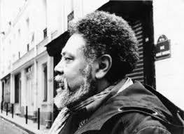 Chalatenango, 1937- París, 1997)